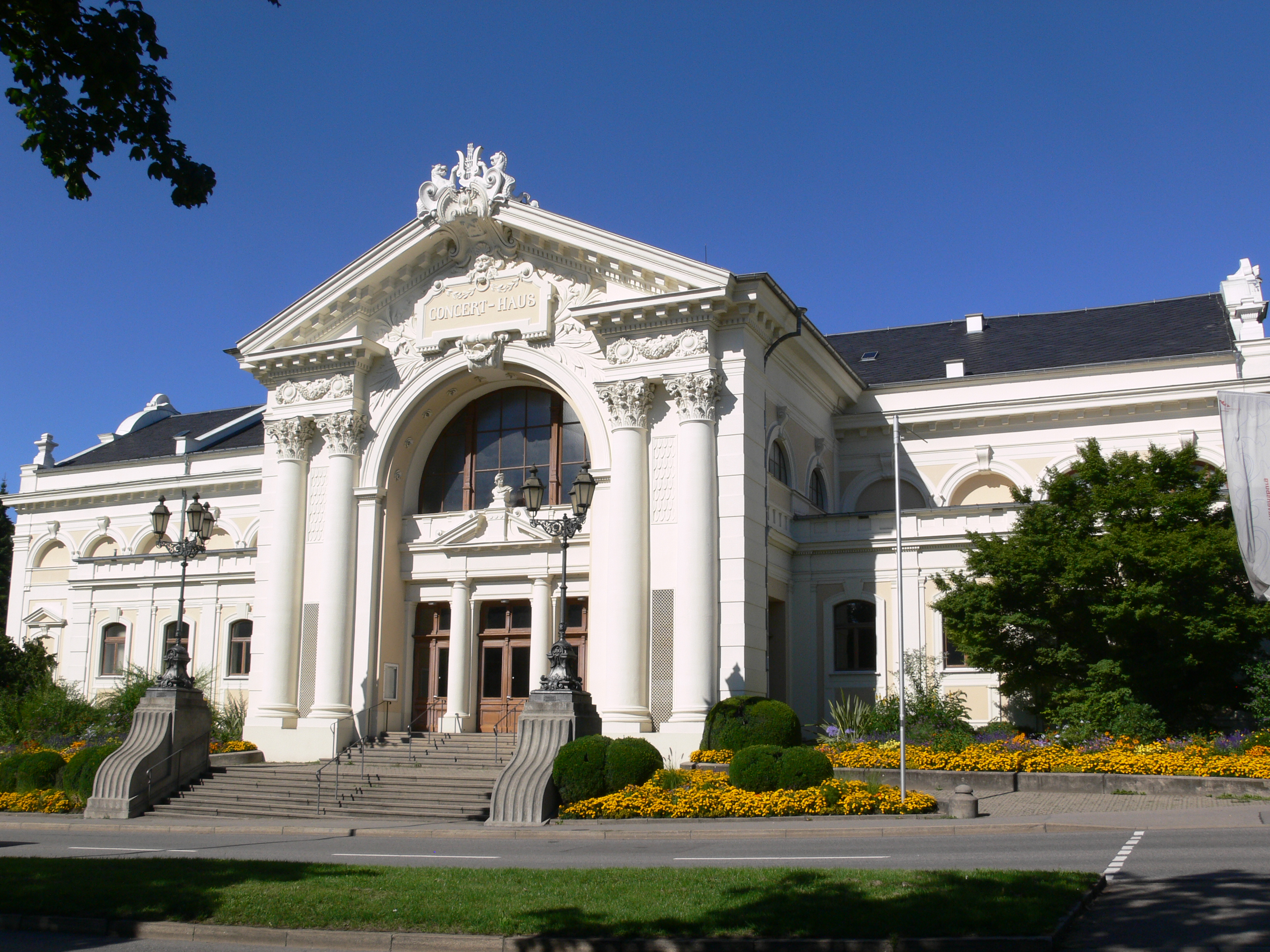 Konzerthaus Ravensburg Hauptfassade zur Wilhelmstraße, Giebelschmuck